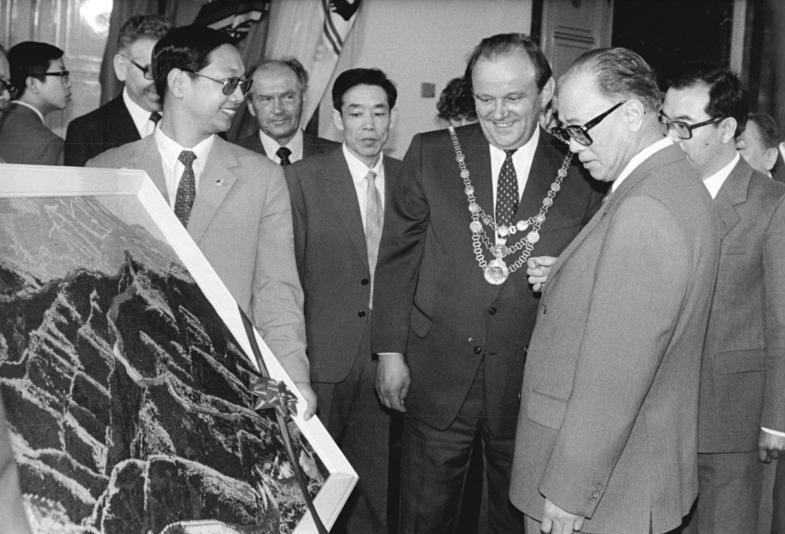 ADN-ZB Mittelstädt 10.6.87 Berlin: Zhao-Besuch Der amtierende Generalsekretär des ZK der RP Chinas und Ministerpräsident des Staatsrates der VR China. Zhao Ziyang (vorn r.), überreichte an Oberbürgermeister Erhard Krack (3.v.r.) im Roten Rathaus ein gewebtes Wandbild. Zugegen war Oskar Fischer (4.v.l.), Minister für Auswärtige Angelegenheiten der DDR.